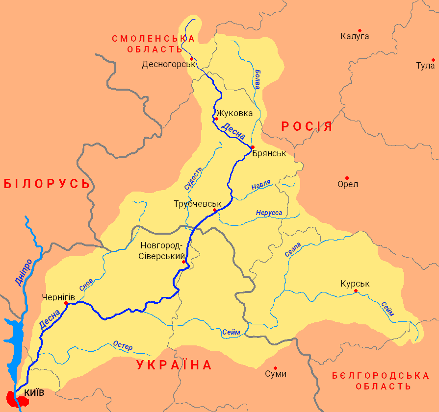 Басейн річки Десна